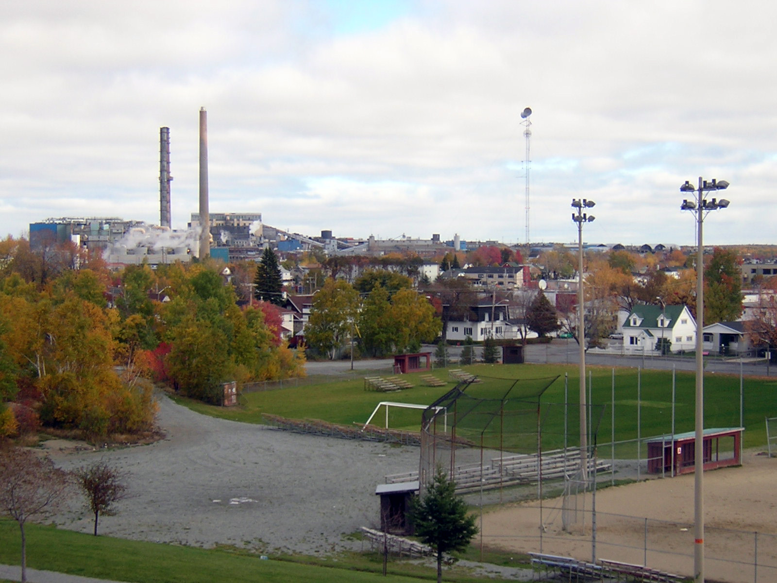 Fonderie Horne vue du cartier Sacré-Coeur, à Rouyn-Noranda, Québec